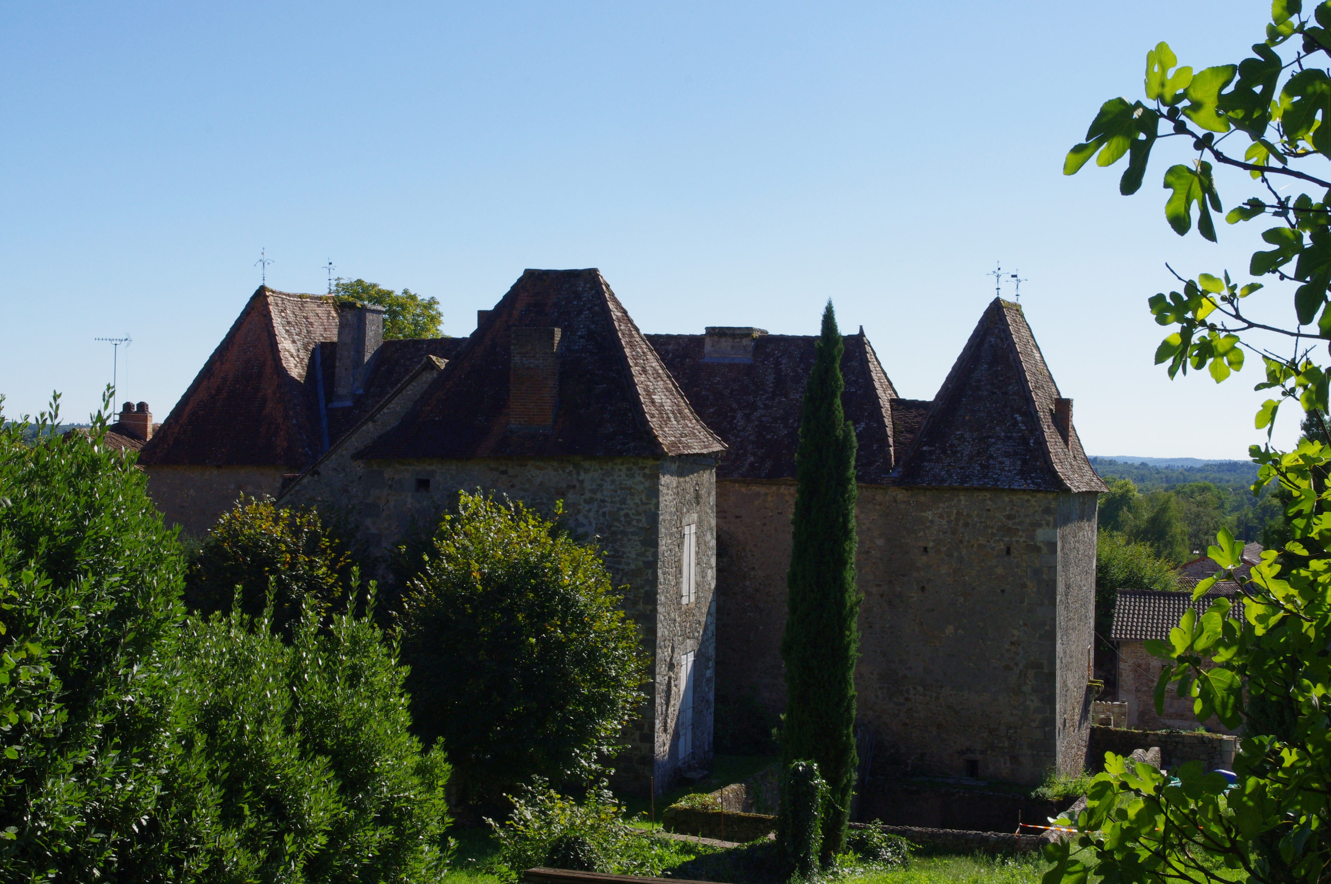 Château de Marval (15e/16e/17e siècle), Haute-Vienne, France